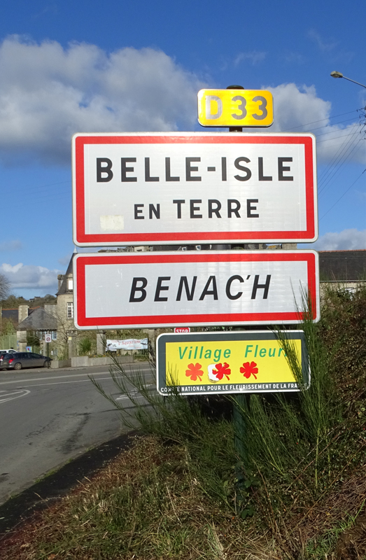 Benac'h. Pannell hent